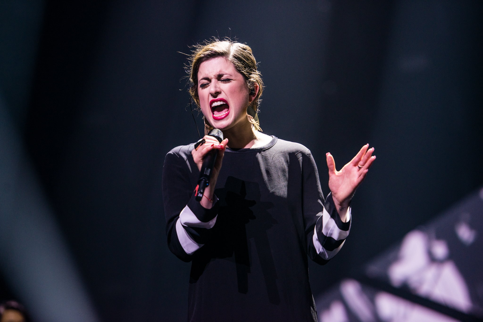 'Eurovision Song Contest 2015 - Unser Song für Österreich': 'Ann Sophie'